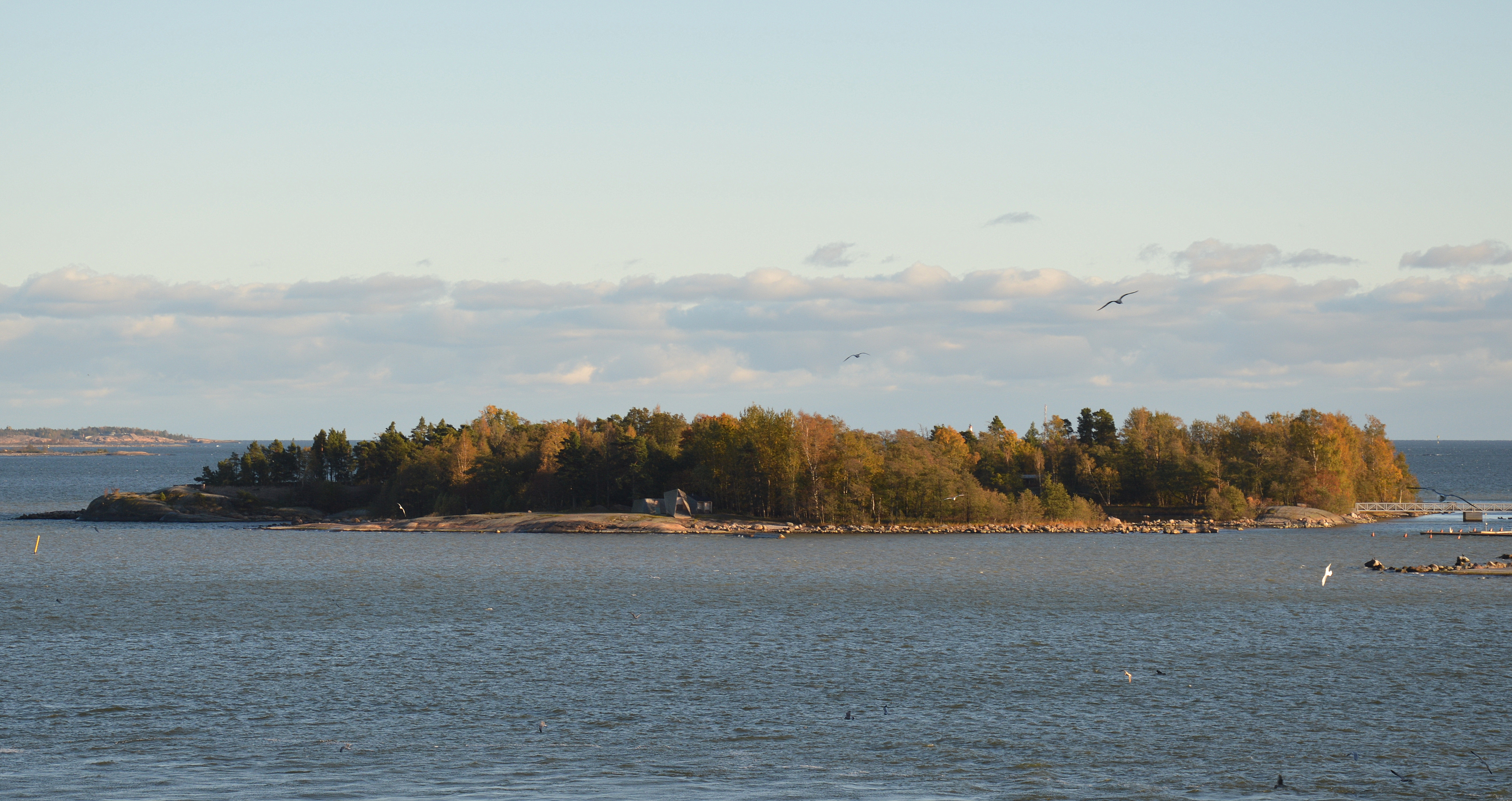 Insel Itäinen Philajasaari in Helsinki